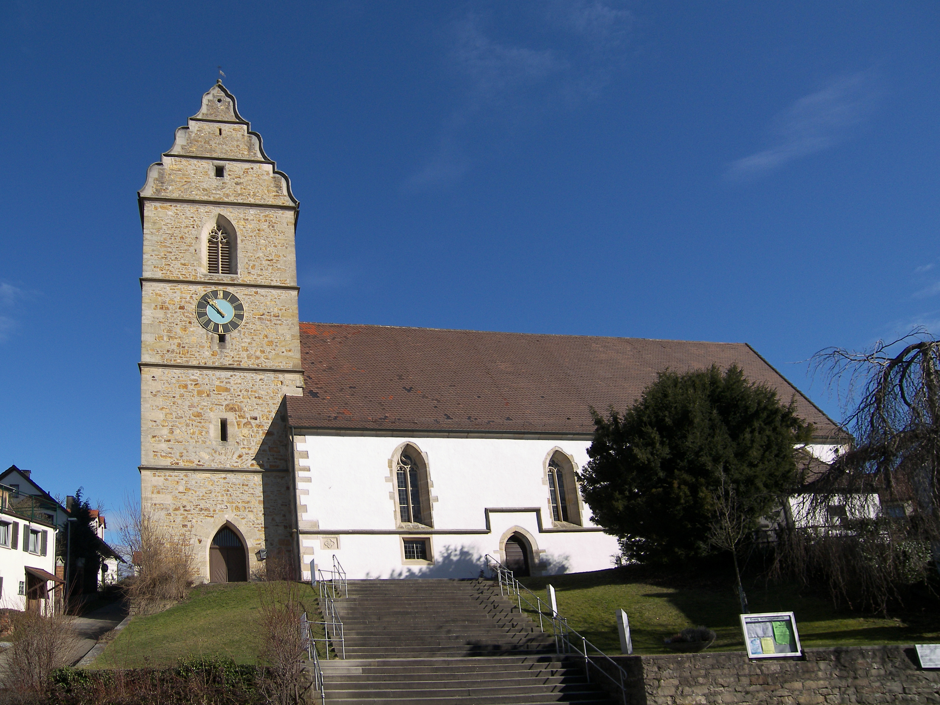 Spätgotische Hallenkirche aus dem 15. Jahrhundert